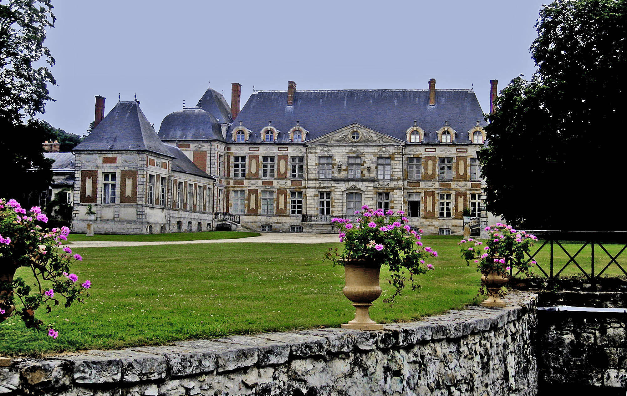 This building is en partie classé, en partie inscrit au titre des Monuments Historiques. .